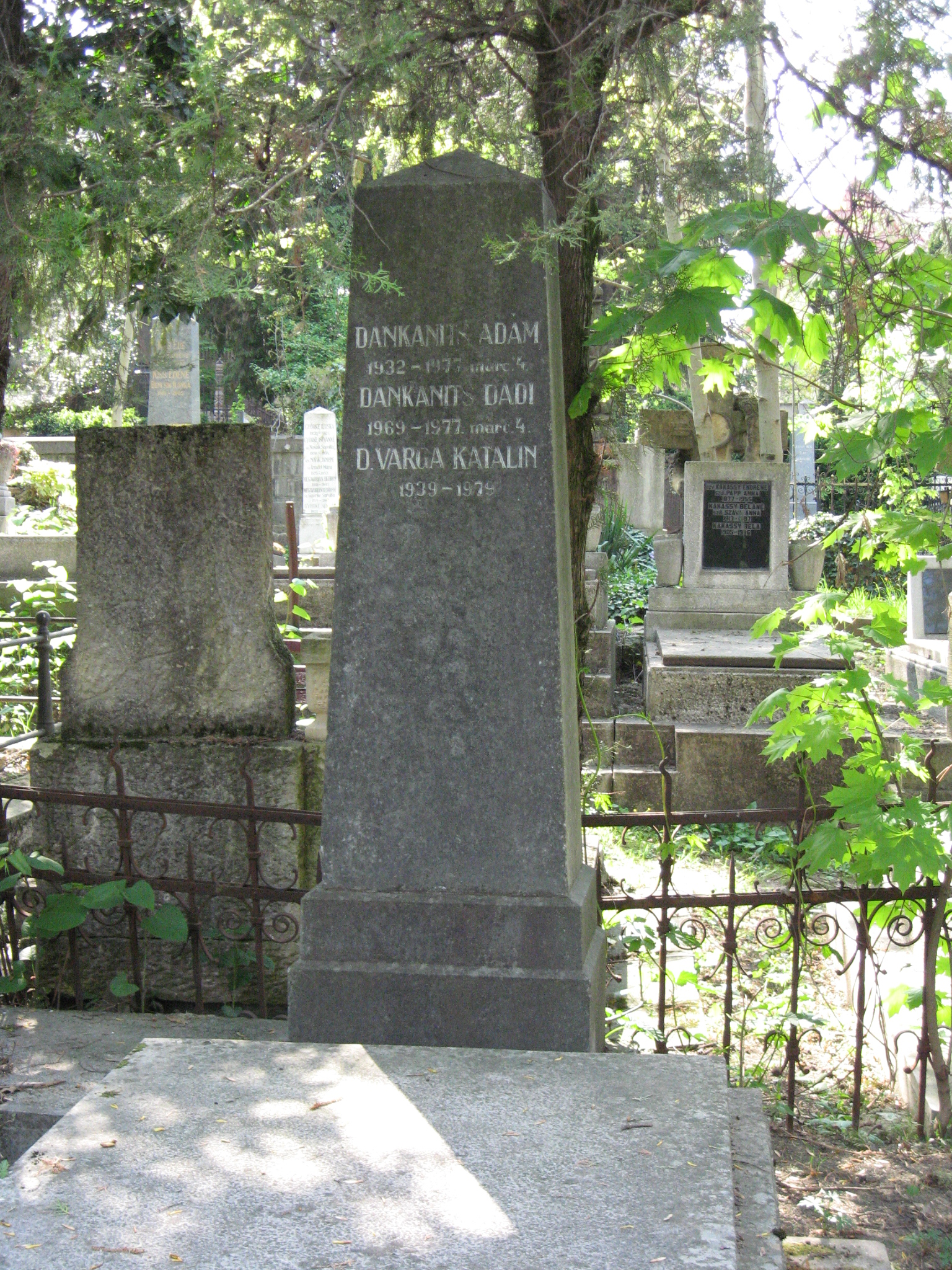 Dankanits Ádám sírja a kolozsvári Házsongárdi temetőben.